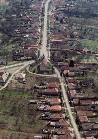 Kóspallag, Hungary, aerialphotography